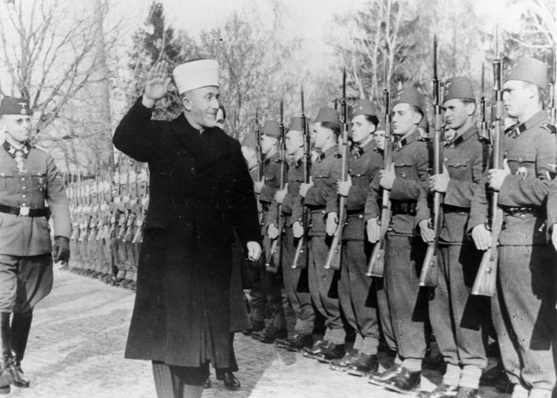 Der Großmufti von Jerusalem bei den bosnischen Freiwilligen der Waffen-SS. Der Großmufti schreitet die Front mit Hitlergruß ab. SS-PK-Kriegsber. Mielke